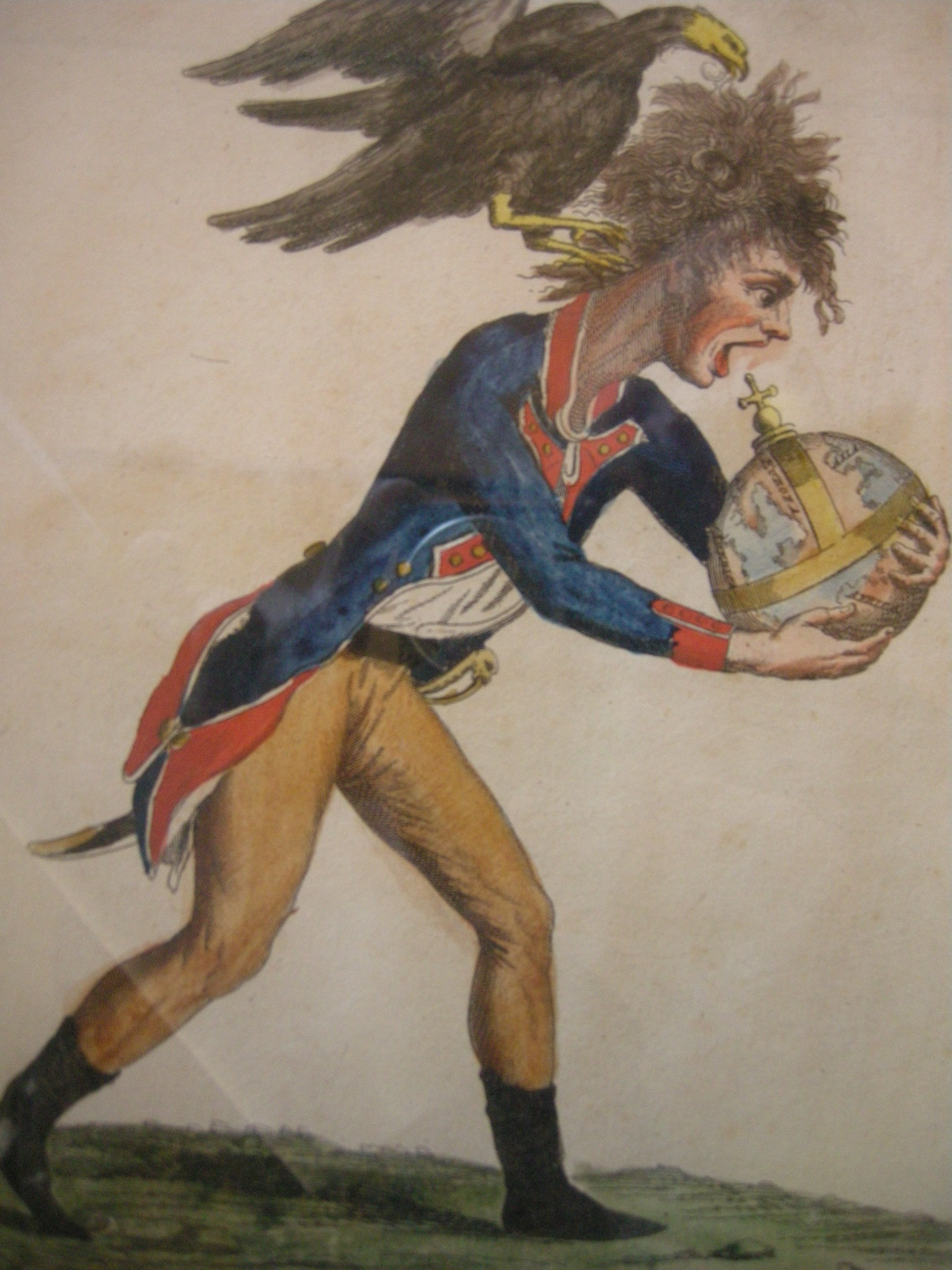 Ingordigia dei francesi, stampa del 1799